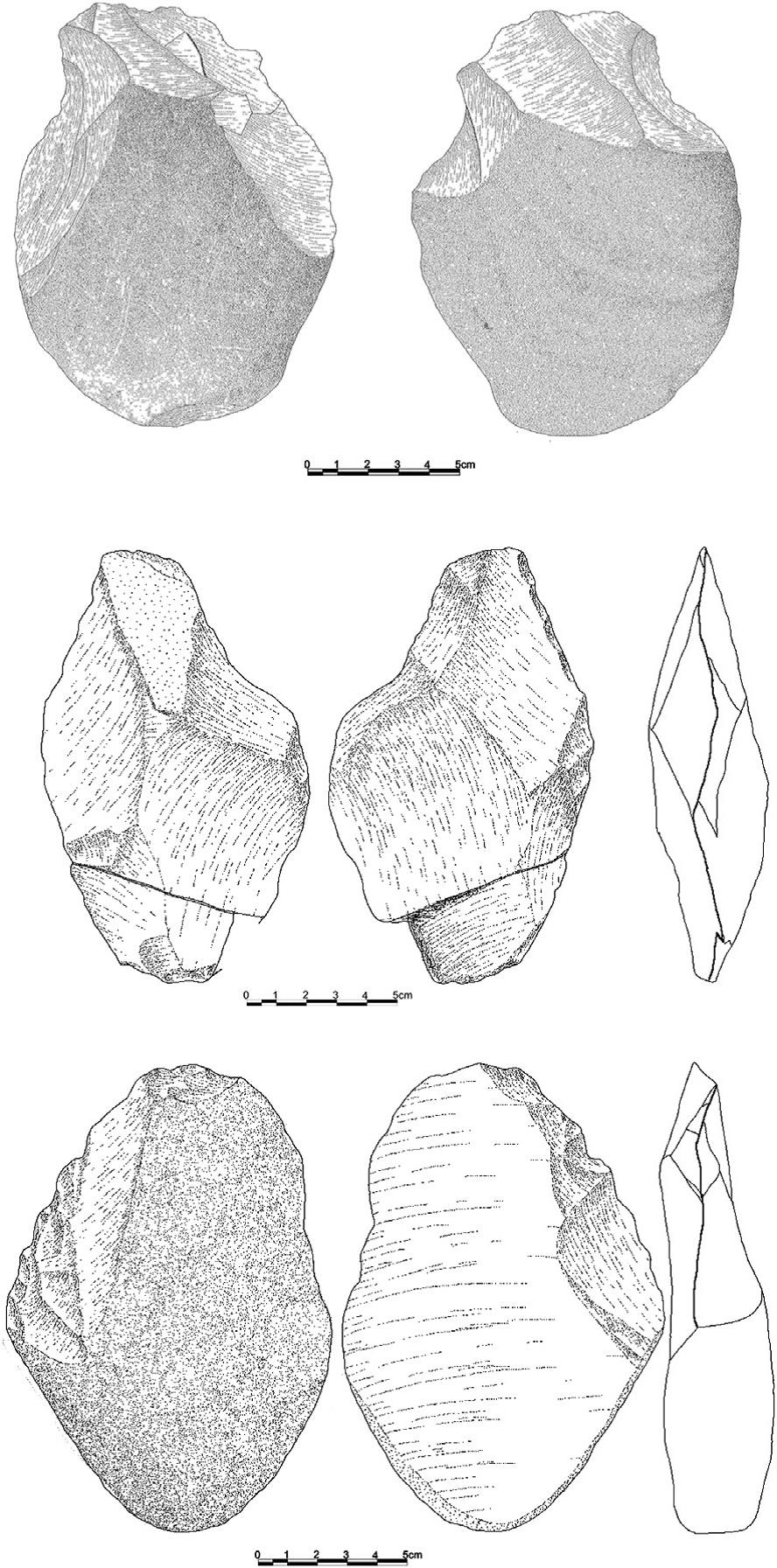 Ilustración de la industria lítica encontrada en el yacimiento arqueológico de Irikaitz.